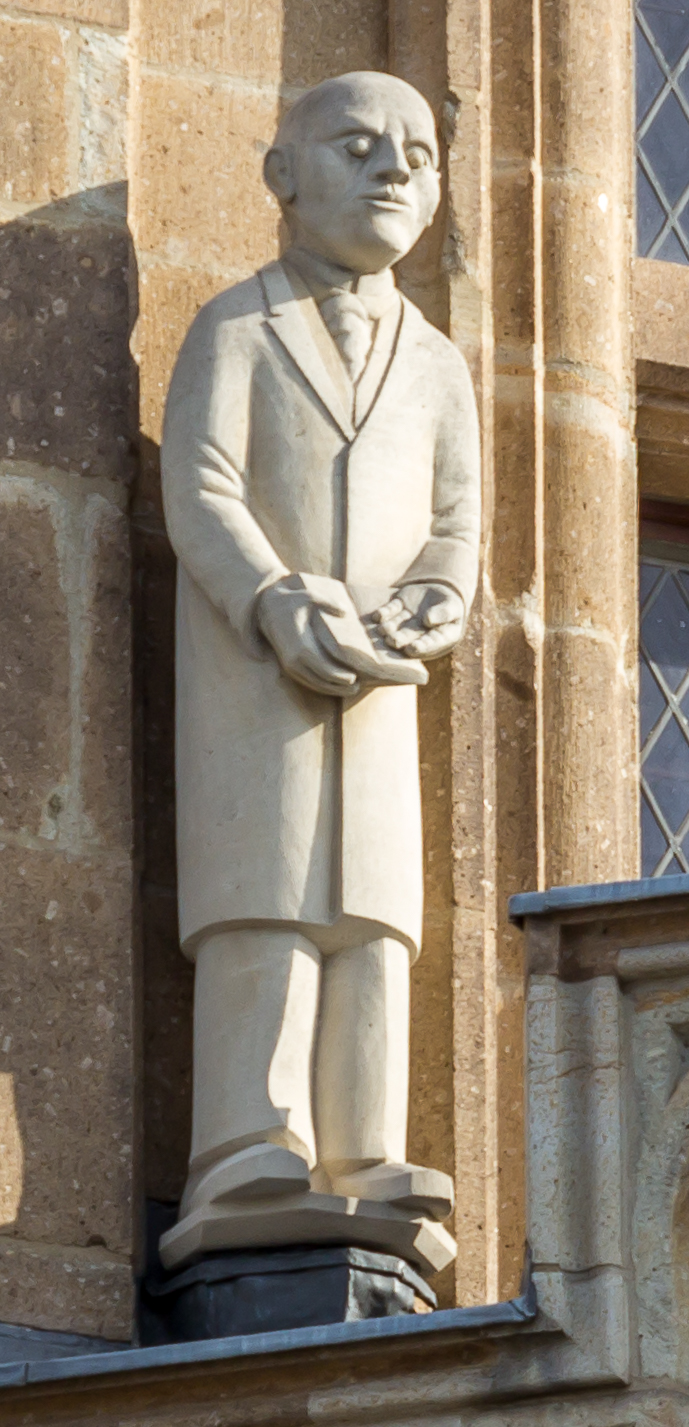 Status des Benedikt Schmittmann. Ohne Konsole